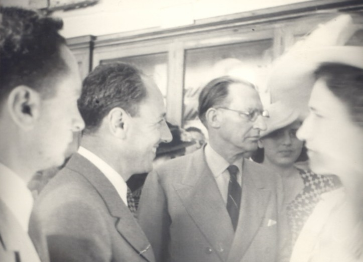 Autore: Gentili collezione Gentili Descrizione: Gentili Gino Vinicio con Luigi Bernabò Brea e Alcide De Gasperi all'inaugurazione del Museo di Siracusa nel 1948.